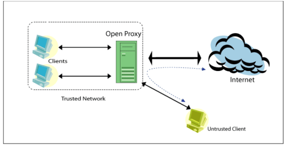 Монгол: Openproxy